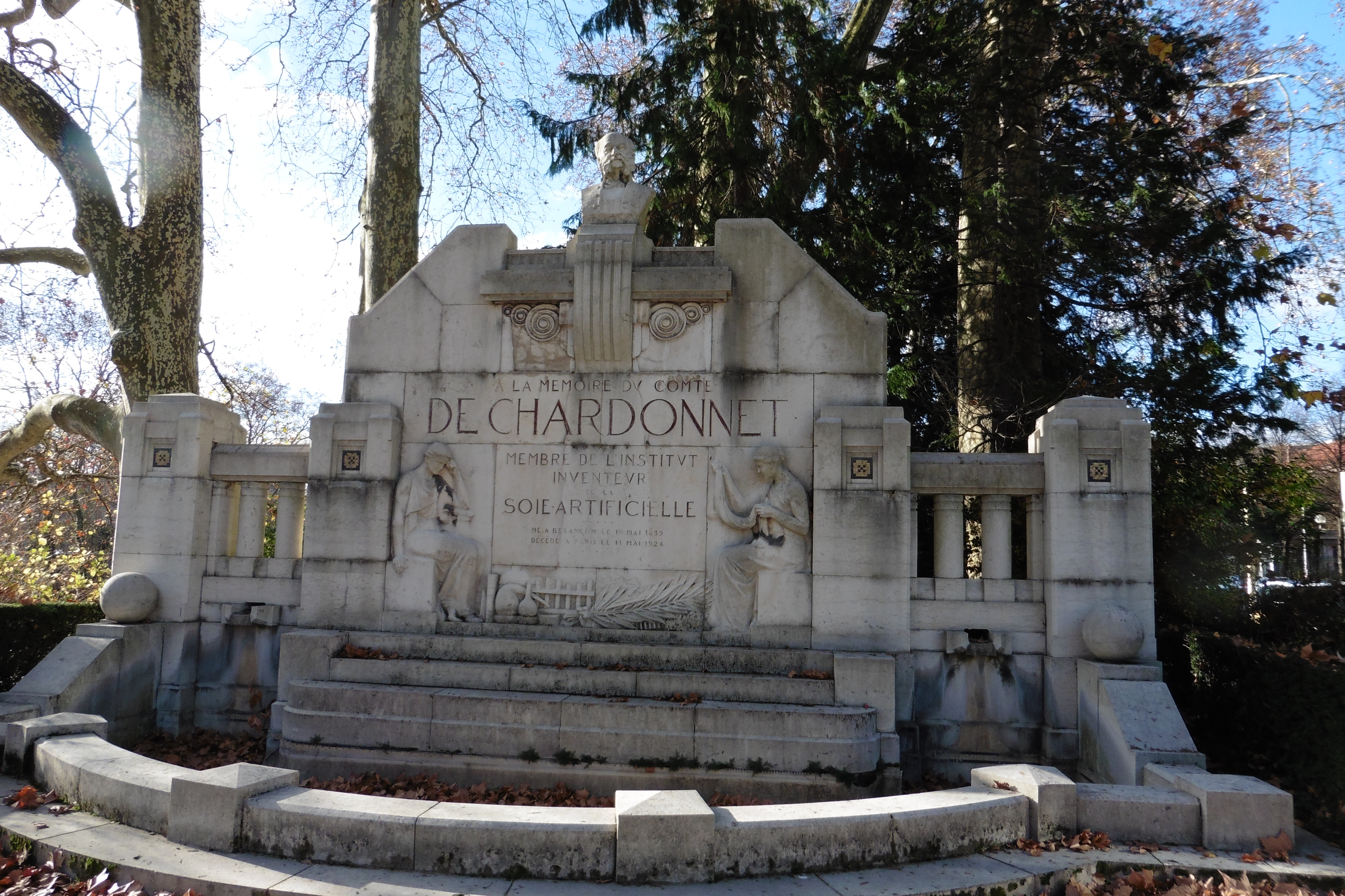 Monument